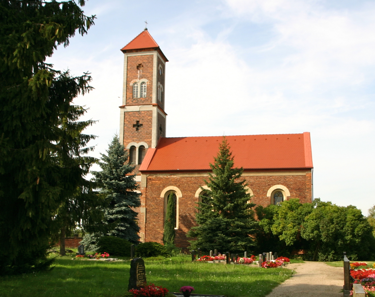 Lausigk ist ein Ortsteil der Stadt Südliches Anhalt im Landkreis Anhalt-Bitterfeld in Sachsen-Anhalt.